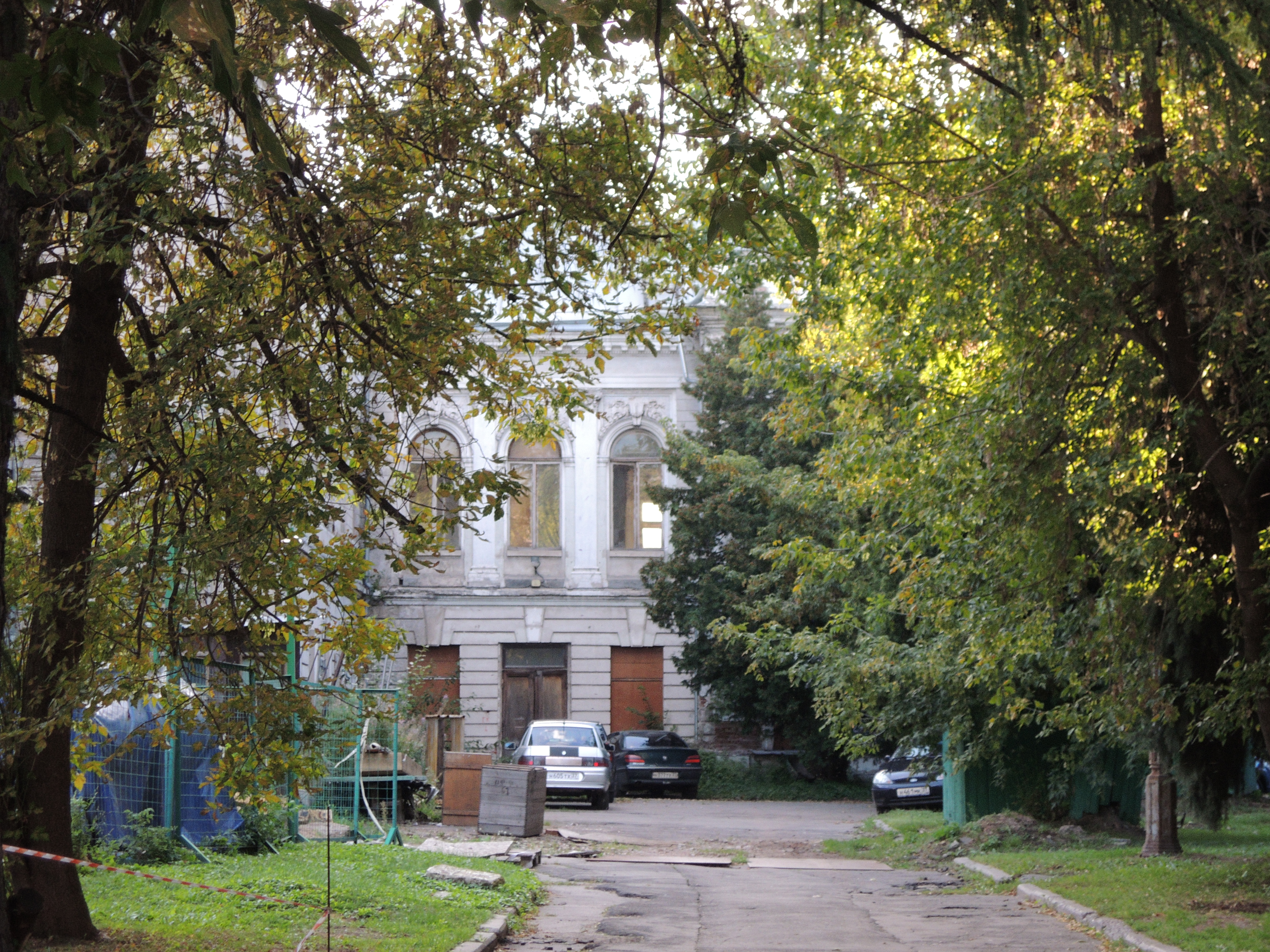 Музейный городок ГМИИ.